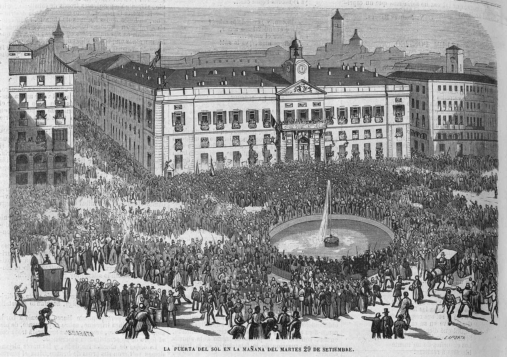 «La Puerta del Sol en la mañana del 29 de septiembre», en la revista española El Museo Universal.